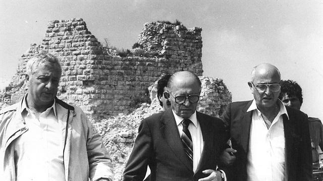 מנחם בגין מלווה על ידי יועץ התקשורת שלו אורי פורת ושר הביטחון אריאל שרון בביקור במבצר הבופור לאחר כיבושו על ידי כוחות צה"ל במבצע שלום הגליל